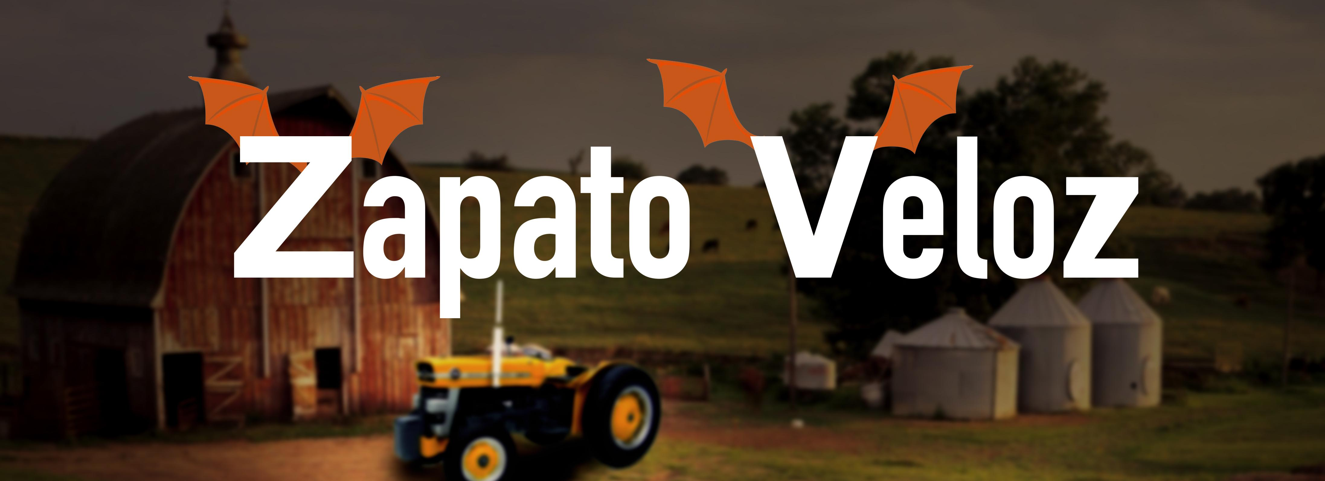 Página Oficial del grupo musical ZAPATO VELOZ